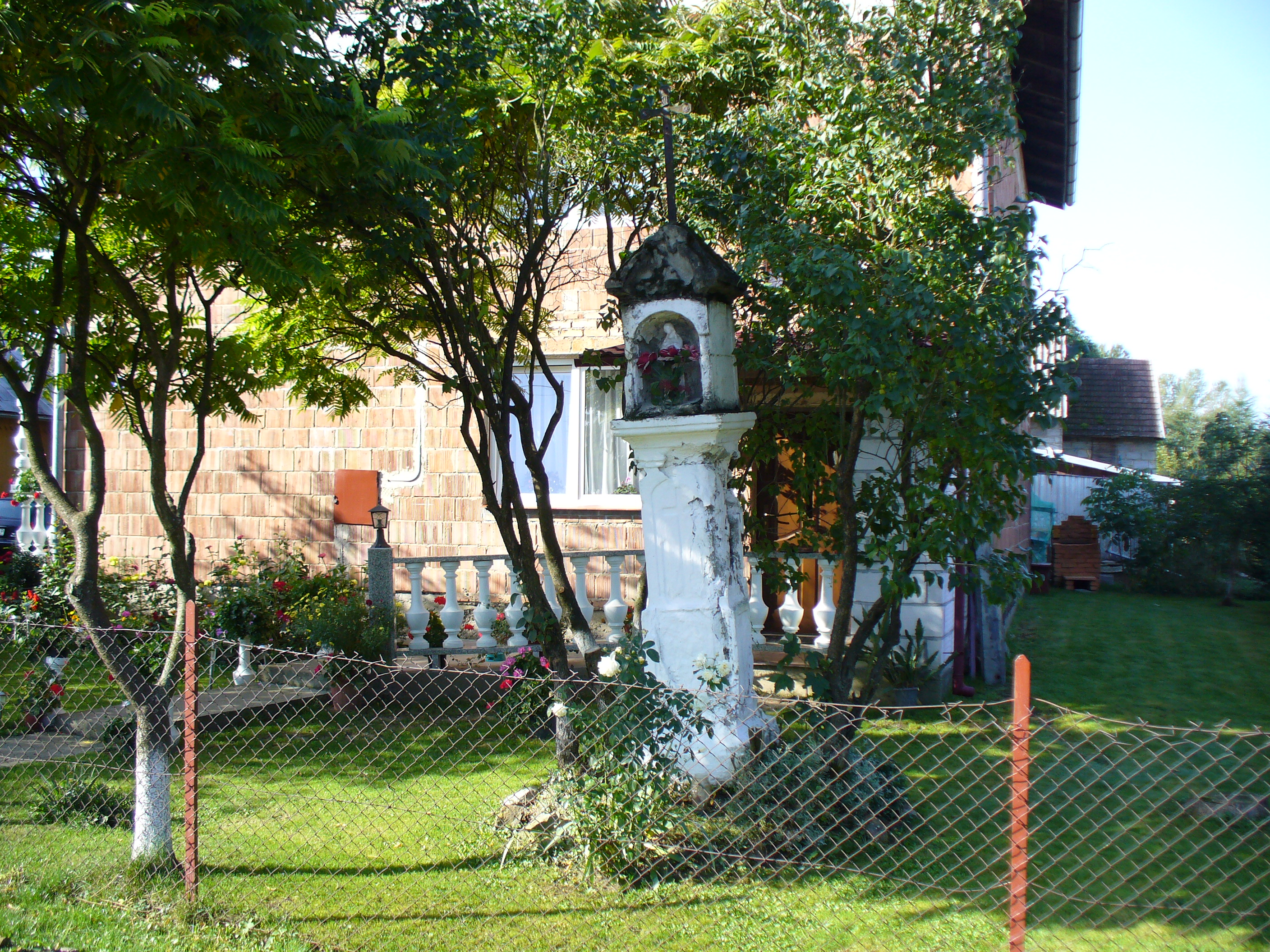 Besko kapliczka z 1866 ul. Zielona